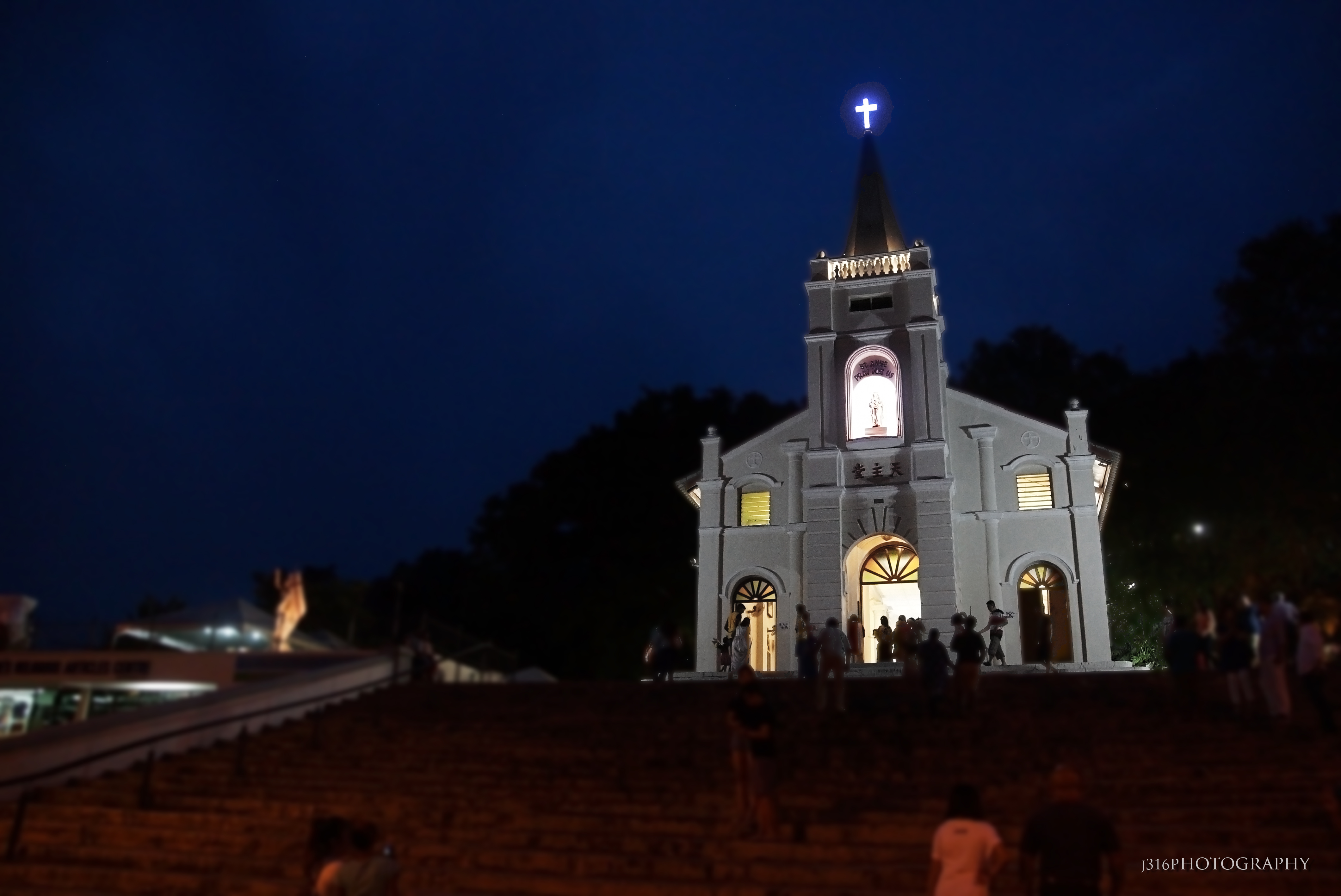 Gereja St Anne Bukit Mertajam